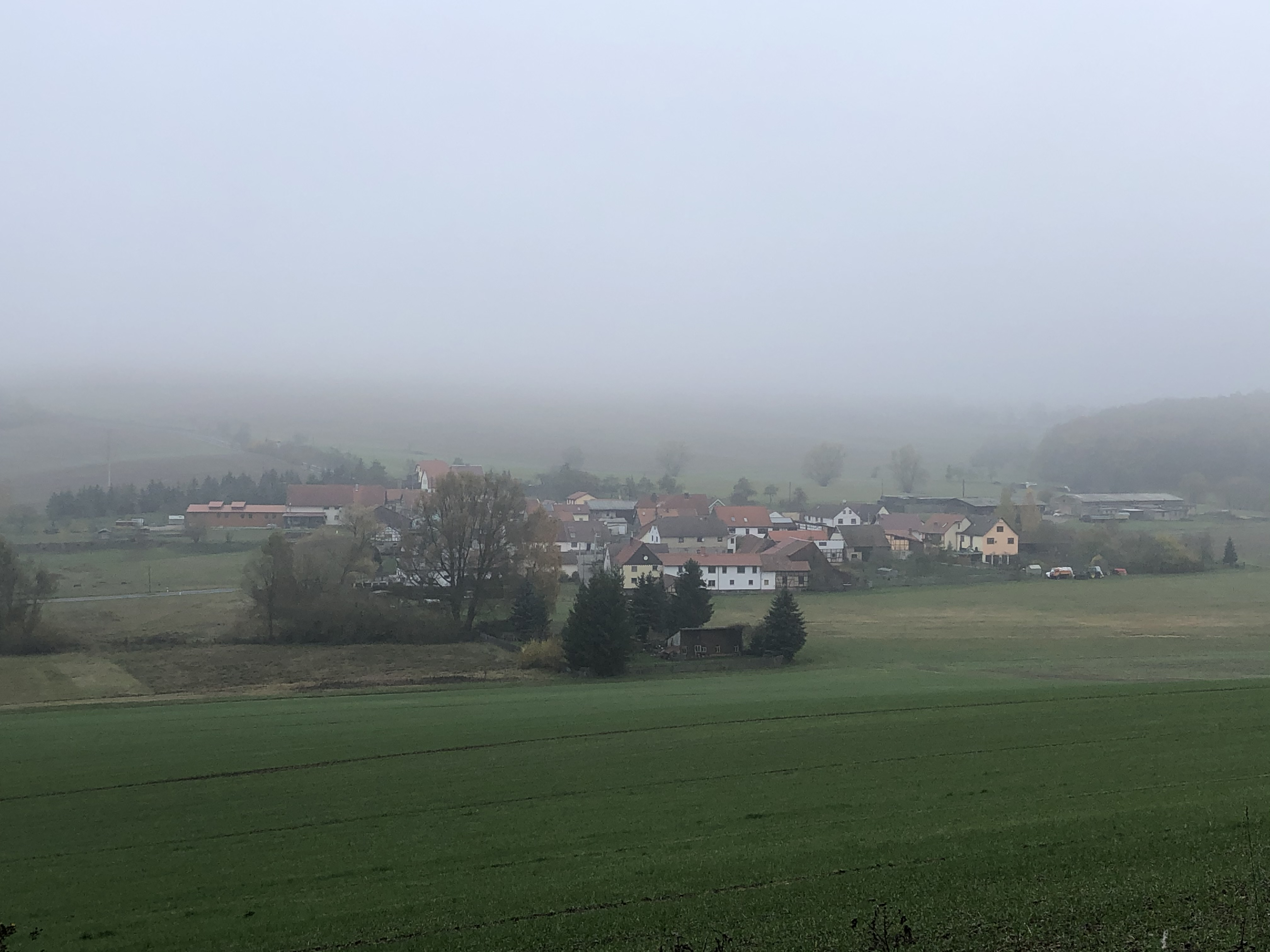 Sonntagsspaziergang